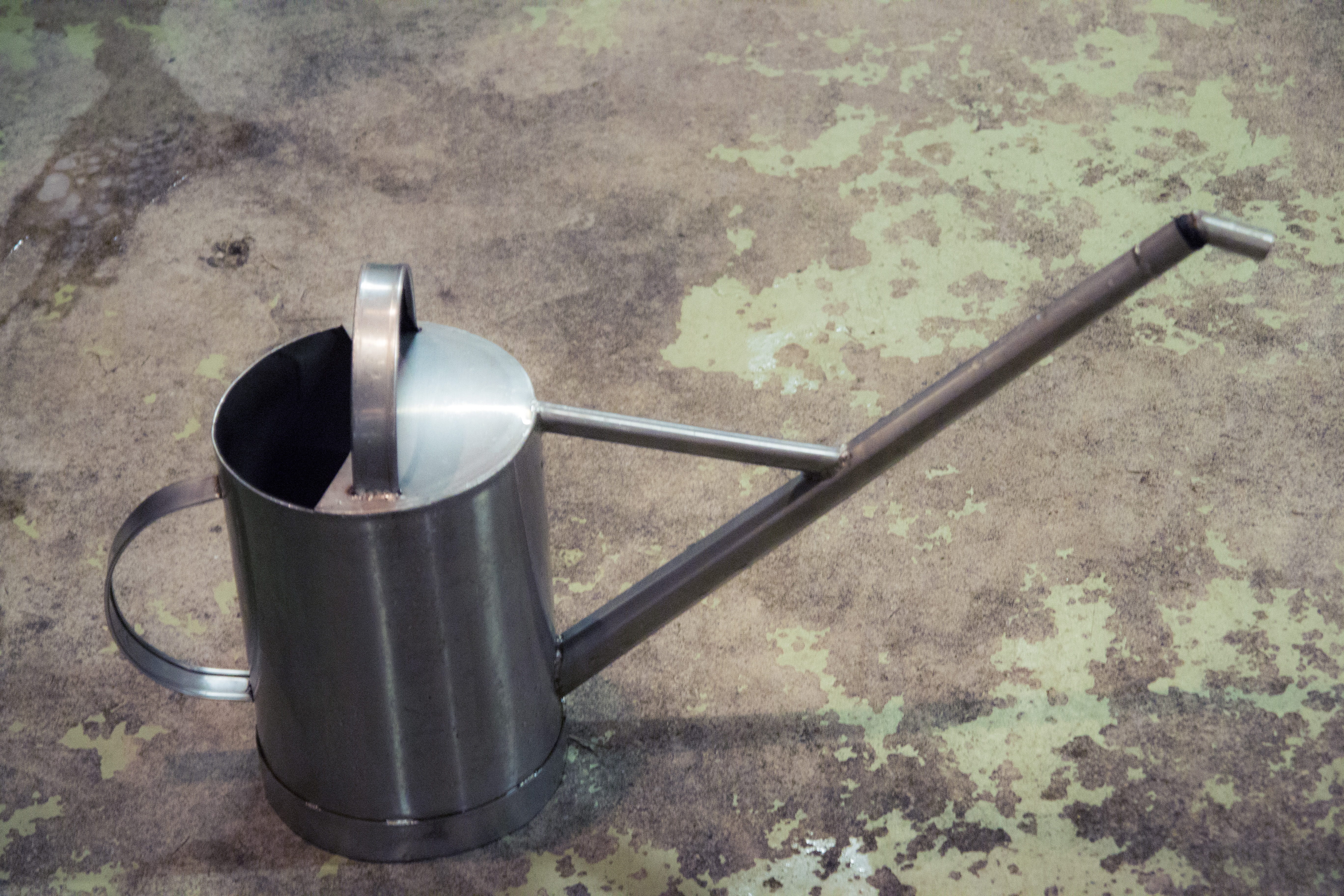 Type arrosoir en inox servant à ouiller les tonneaux de vin